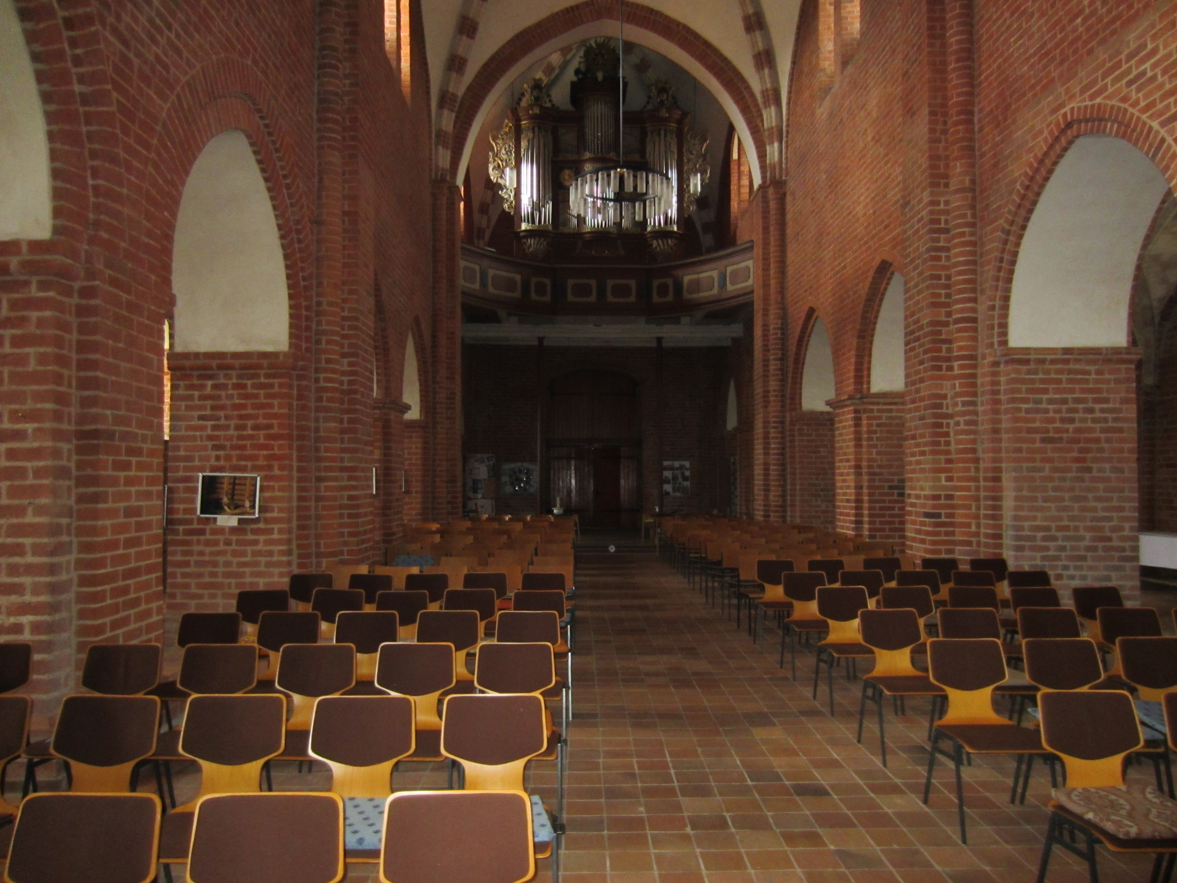 Stadtkirche St. Marien in Treuenbrietzen, Blick durch das Mittelschiff in Richtung Westen